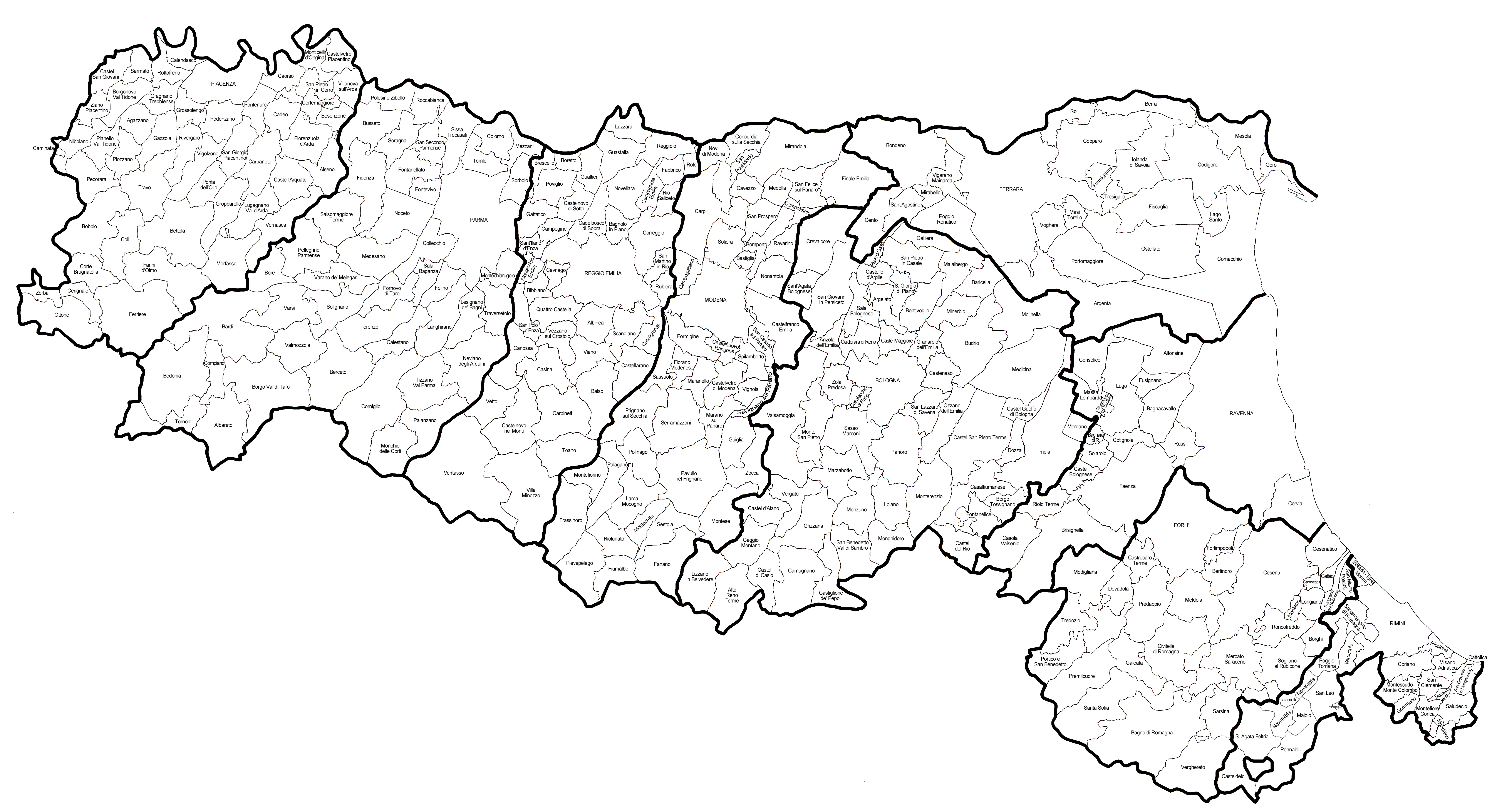 mappa della regione Emilia-Romagna aggiornata con l'annessione di nuovi comuni alla Provincia di Rimini